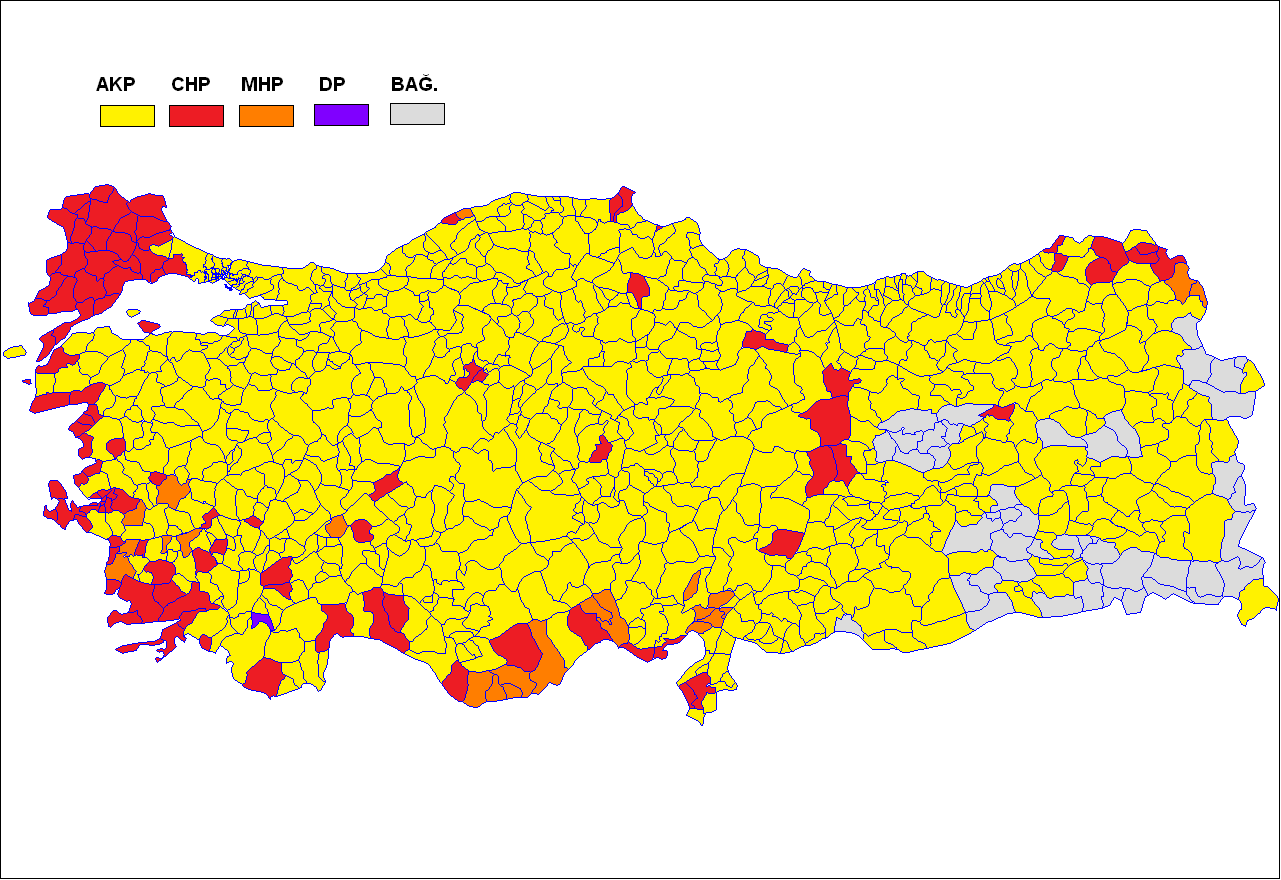 2007 genel seçimleri sonucunun Türkiye haritasında ilçe ilçe gösterimi.